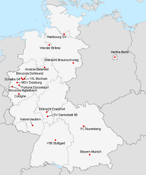 Répartition des clubs en 1.Bundesliga 1978-1979.